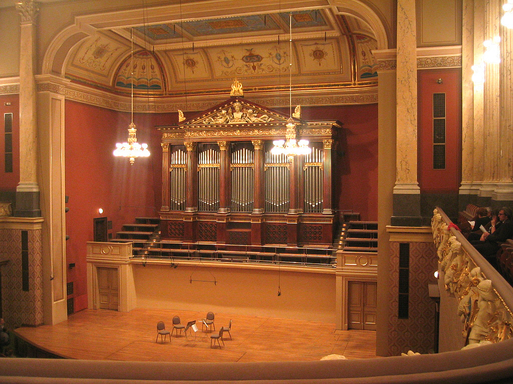 Praha, Rudolfinum concert hall